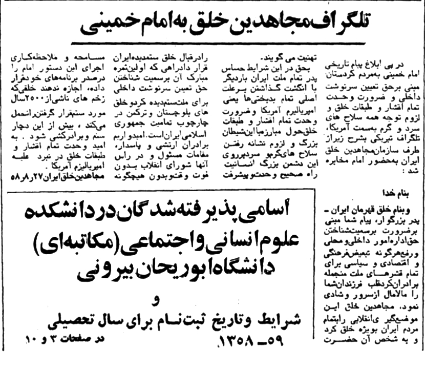 تلگراف سازمان مجاهدین خلق ایران به روح الله موسوی خمینی